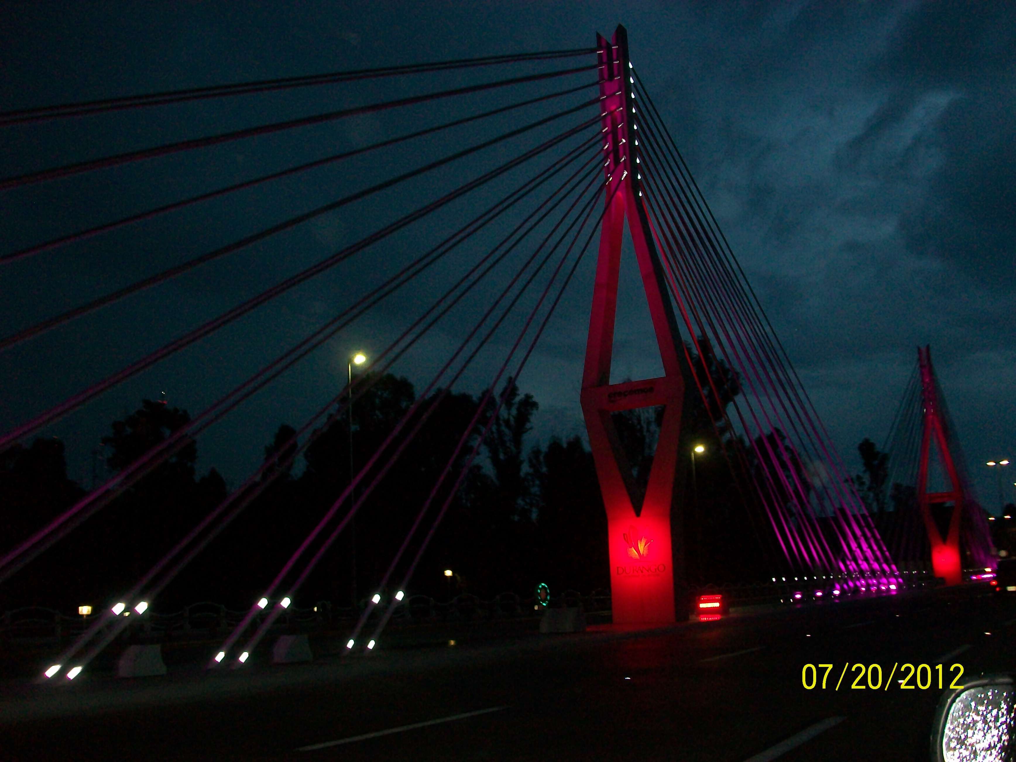 Nuevo puente Mini Baluarte.